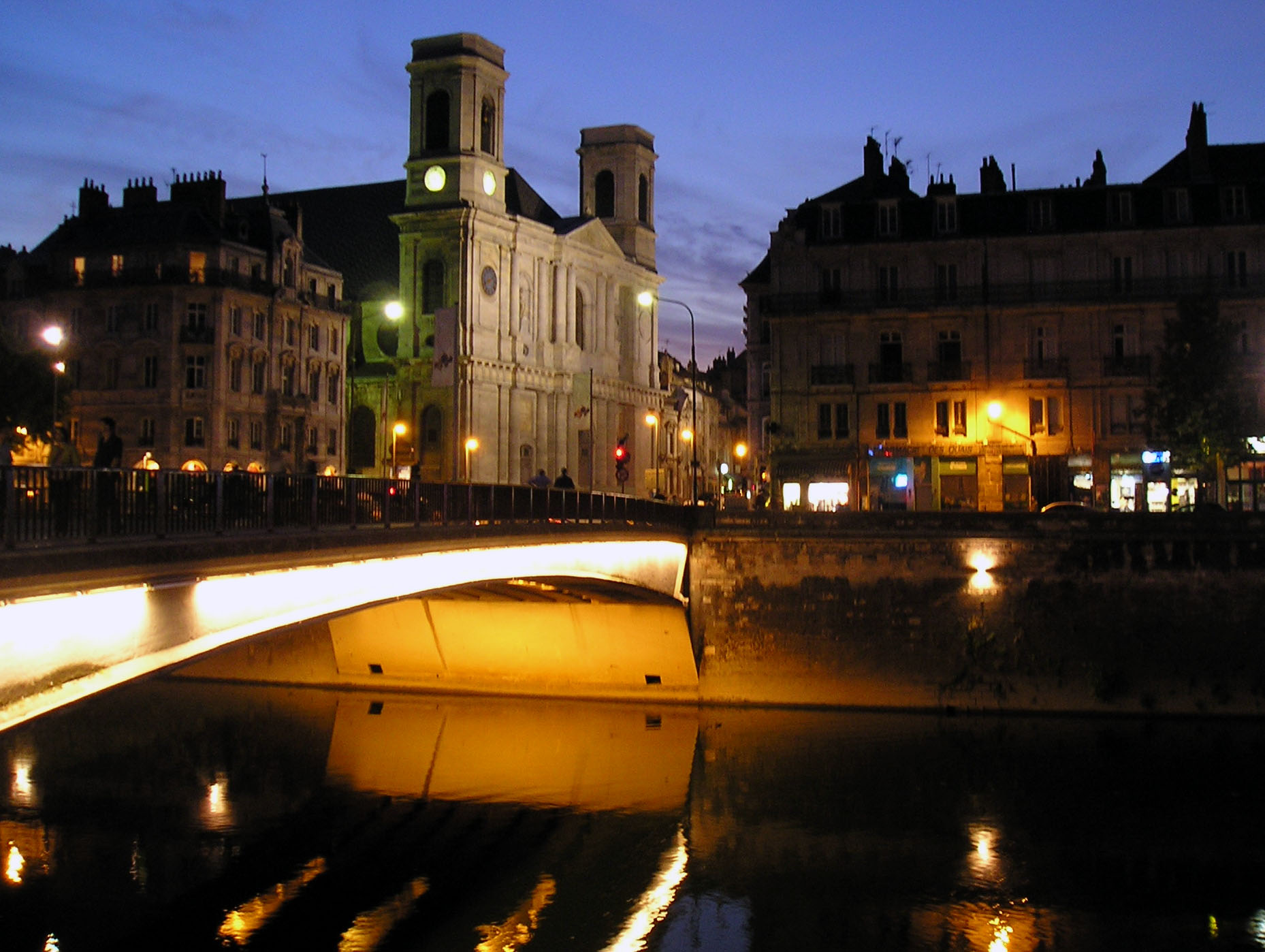 Le quartier Battant de Besançon du depuis le quai Vauban. Au premier plan, le pont Battant. Au second plan, l'église de la Madeleine.